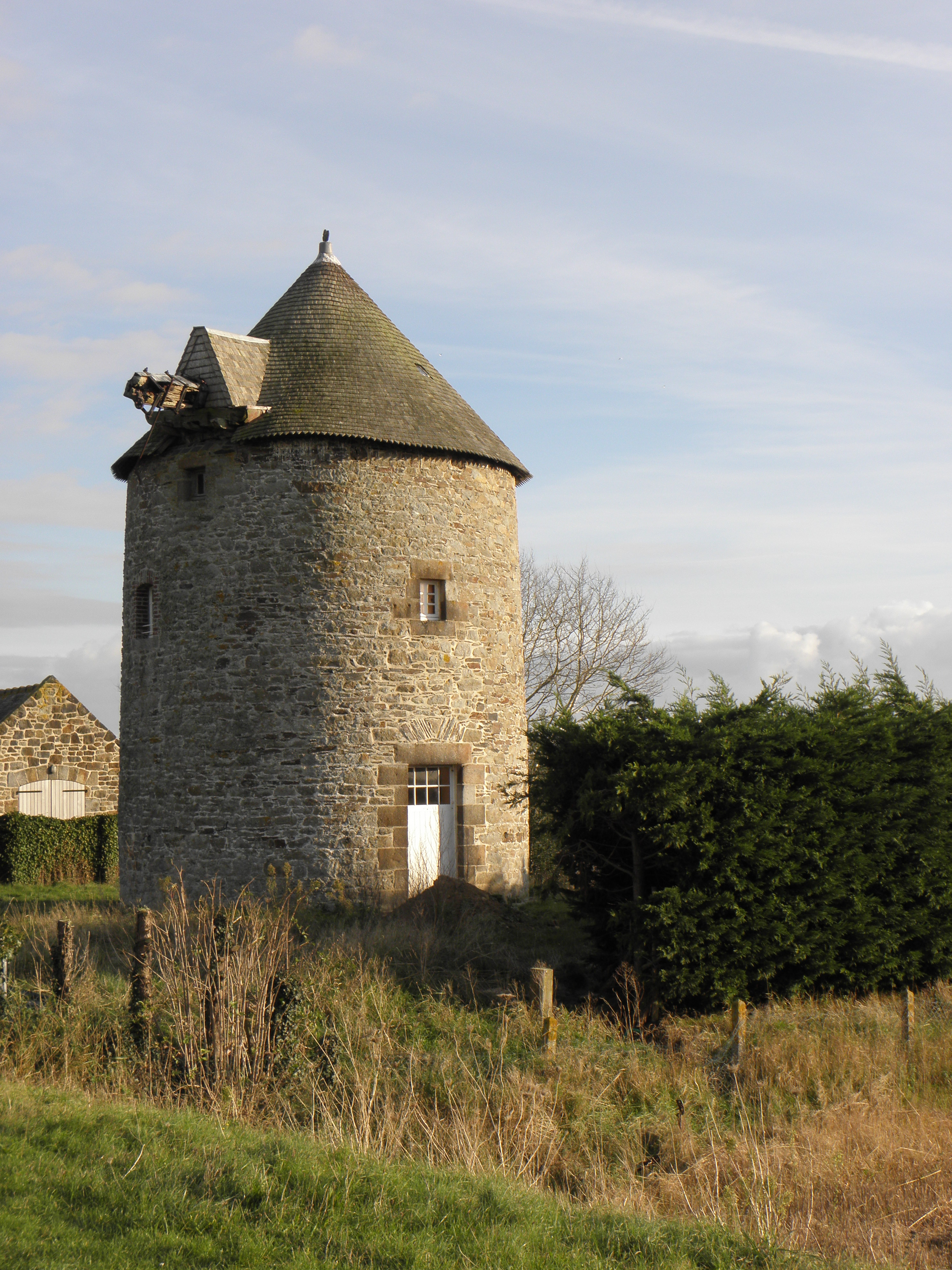 Moulin des Mondrins sis à Cherrueix (35).